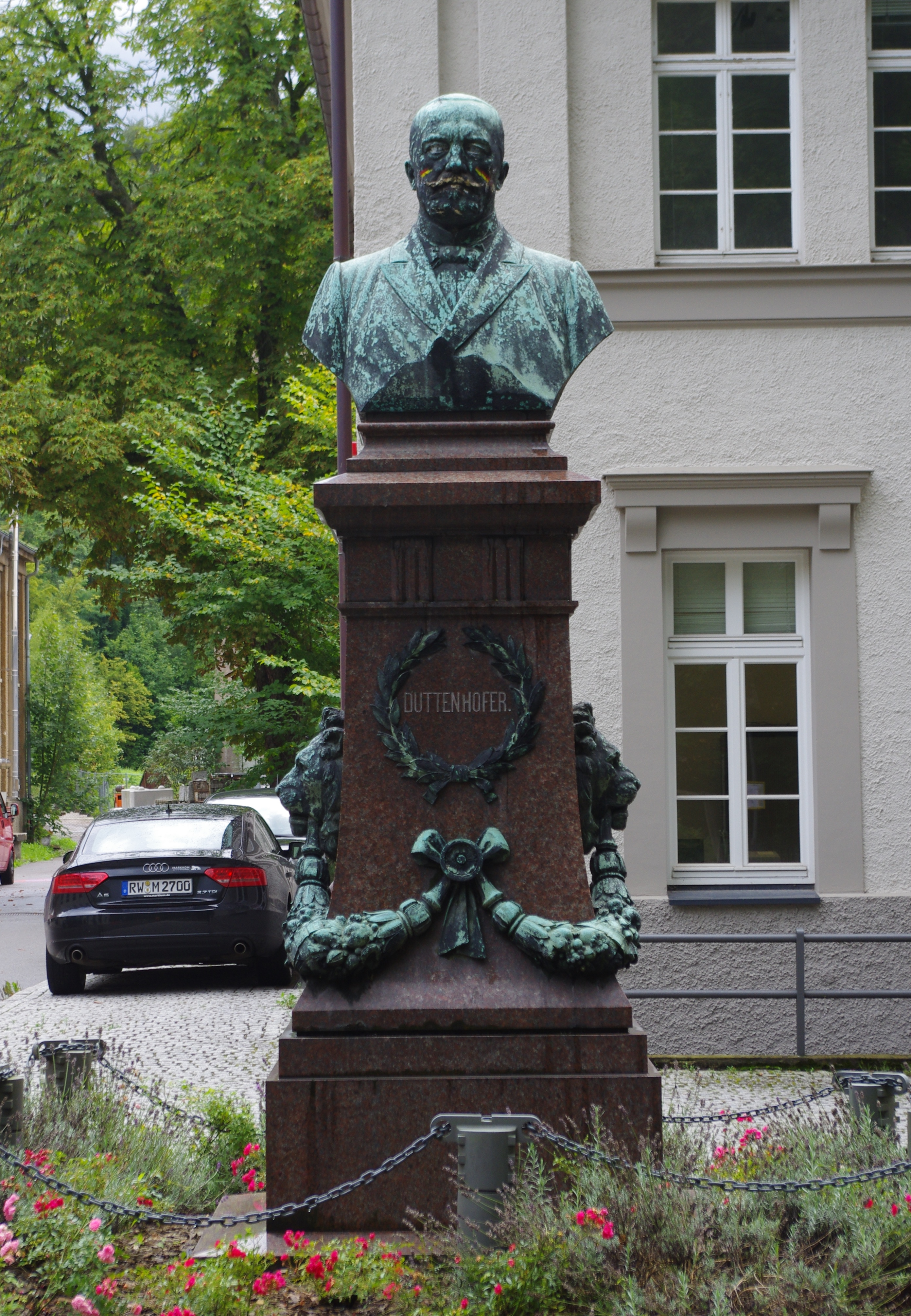 Denkmal für Max Duttenhofer, Neckartal 167, Rottweil, Gelände der ehemaligen Pulverfabrik Rottweil - Google Maps - Google Earth